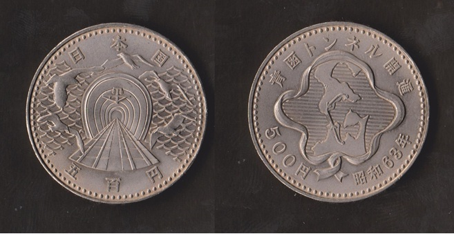 日本の記念硬貨